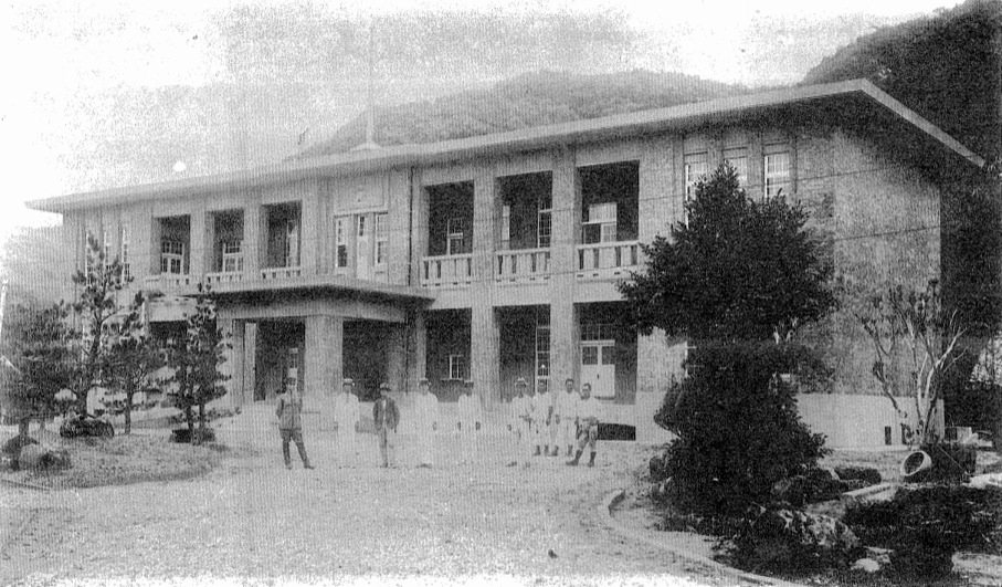 中文（台灣）: 基隆要塞司令部廳舍鑒於1928年，隔年完工，為一棟鋼筋混凝土造的兩層樓建築。